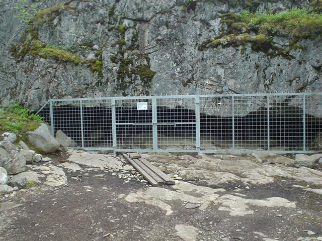 Susiluola